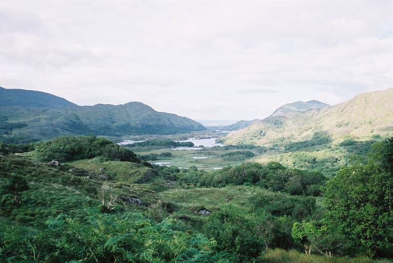 Bild auf den Upperlake im Killarney-Nationalpark vom Ladies-View aus